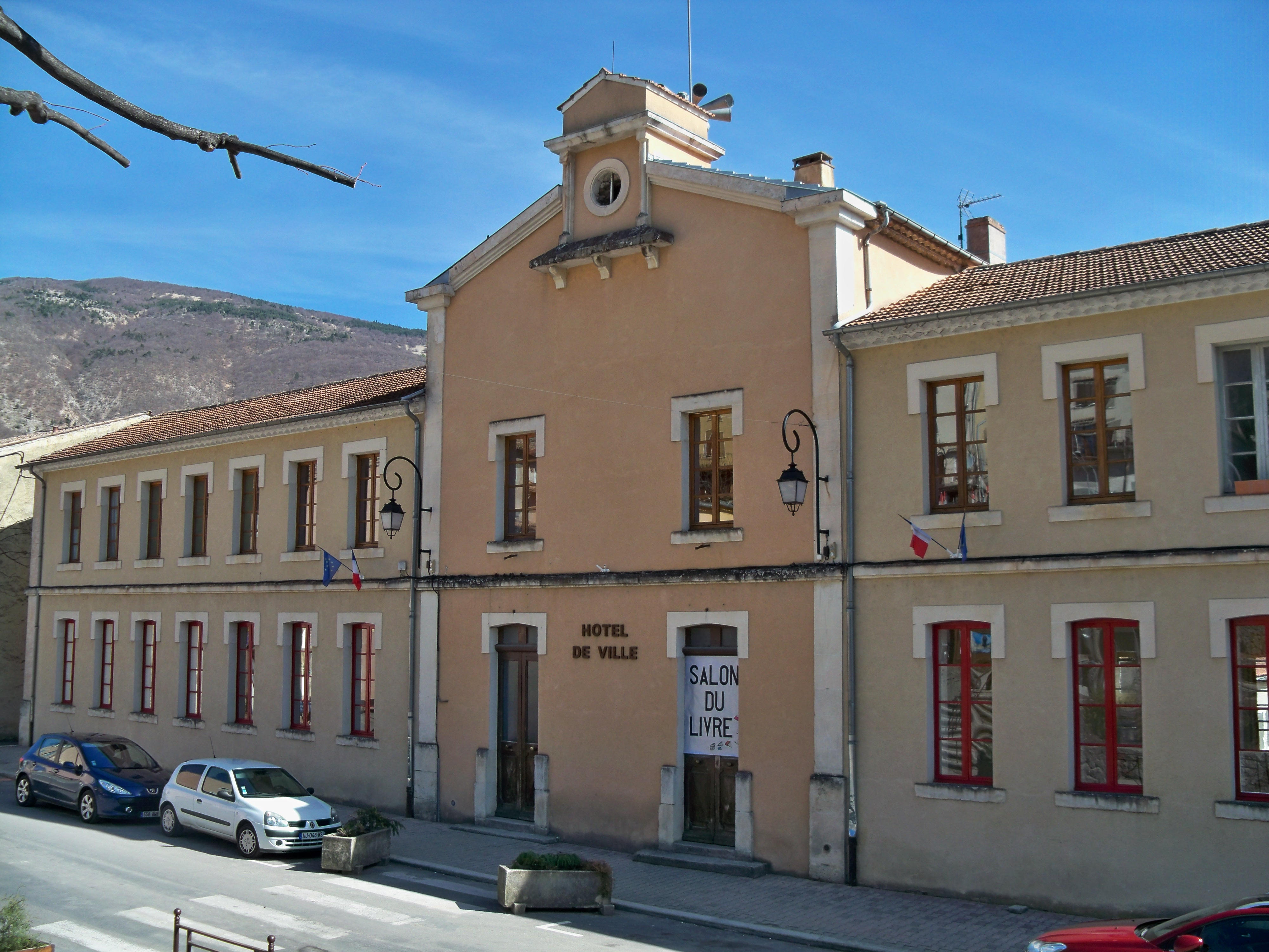 Mairie de Montbrun (26)